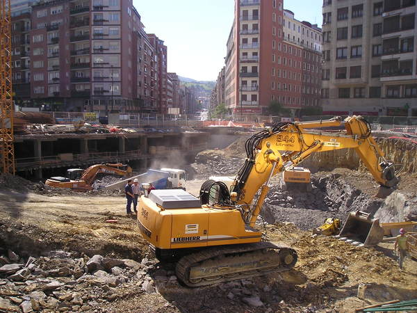 Zabalburuko aparkalekua.